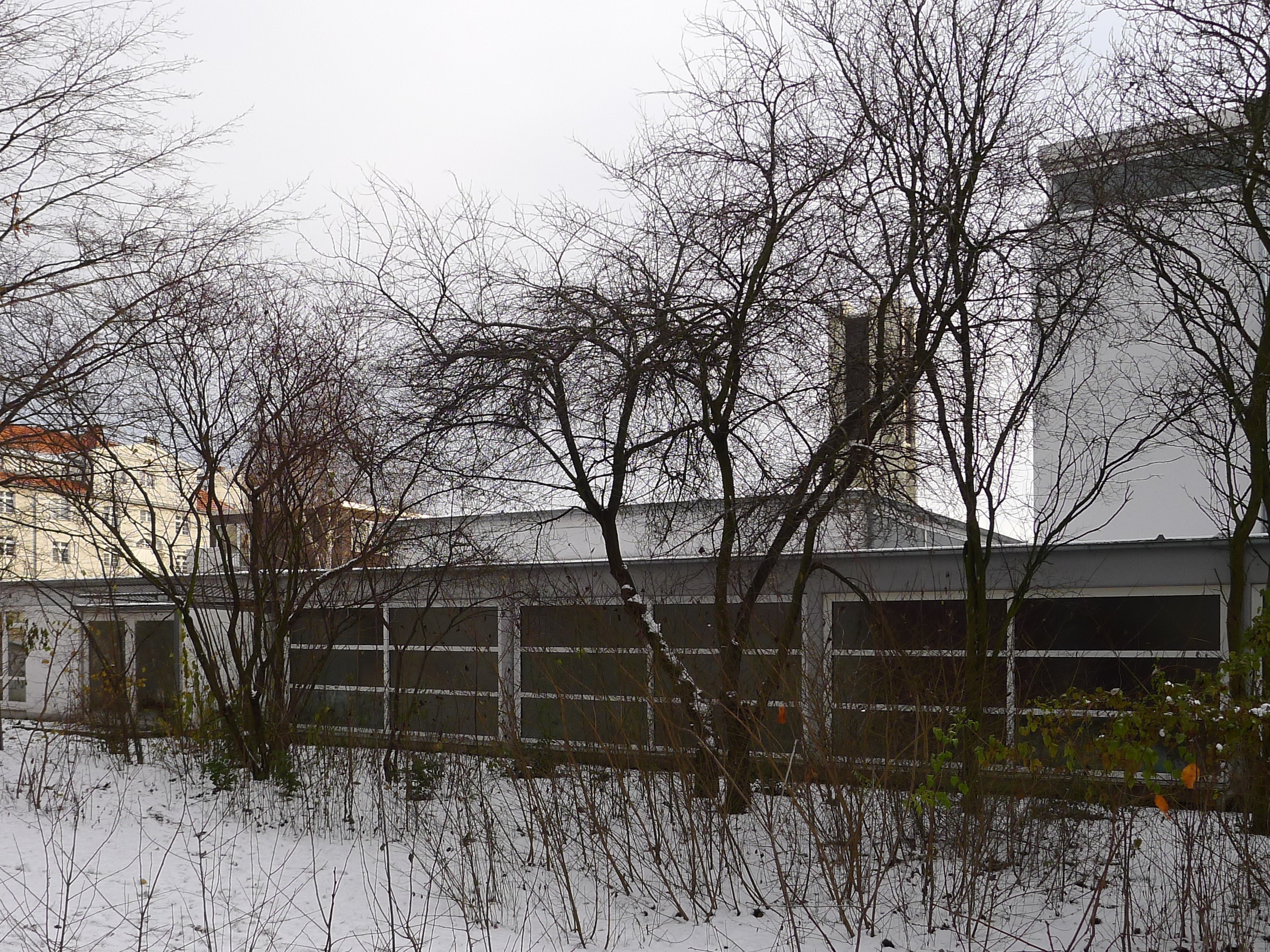 Umgang vor dem hohen Kirchenschiff und dem niedrigen Gemeindesaal, dahinter der Campanile